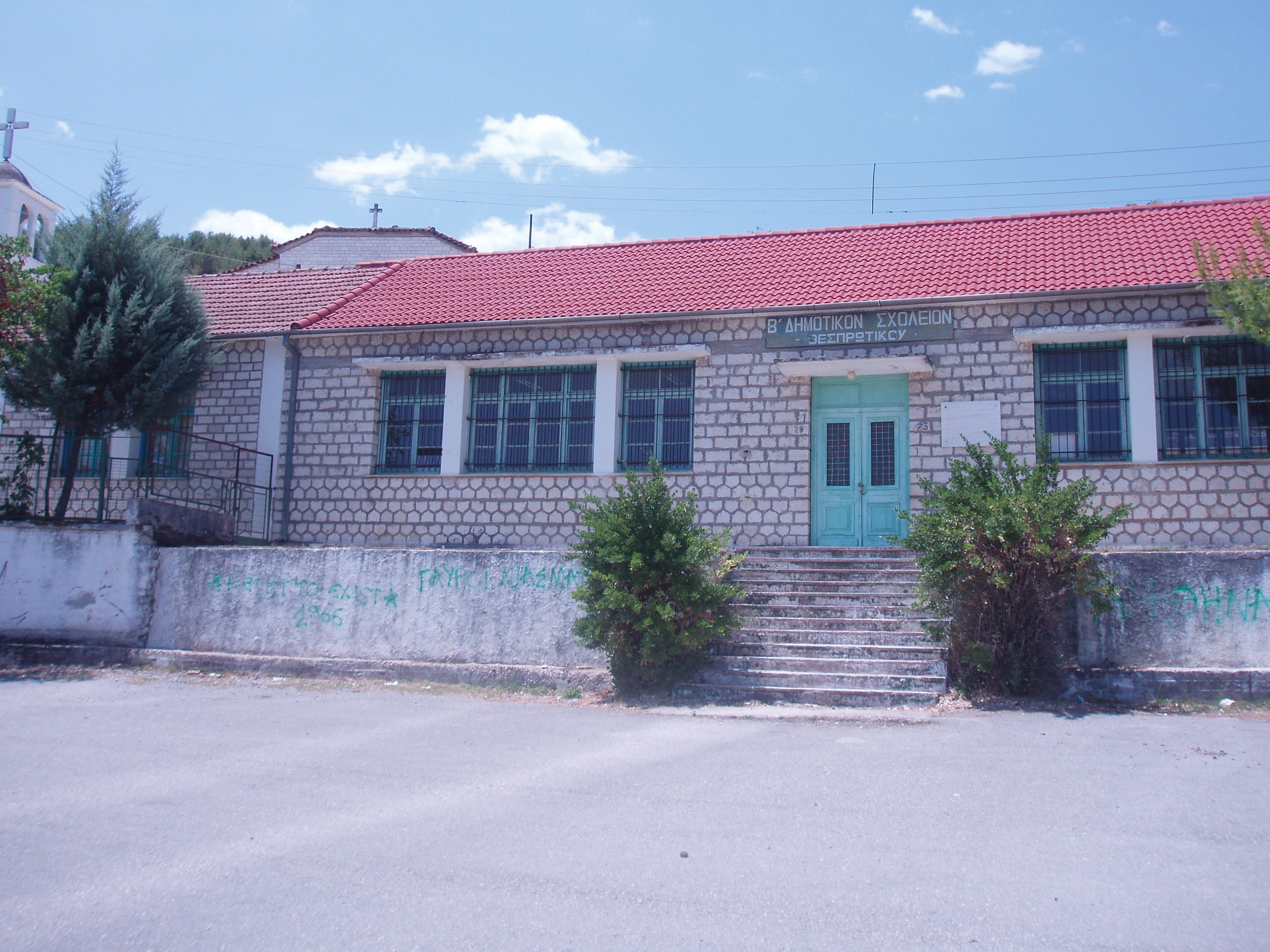 Β΄ Δημοτικό σχολείο Θεσπρωτικού